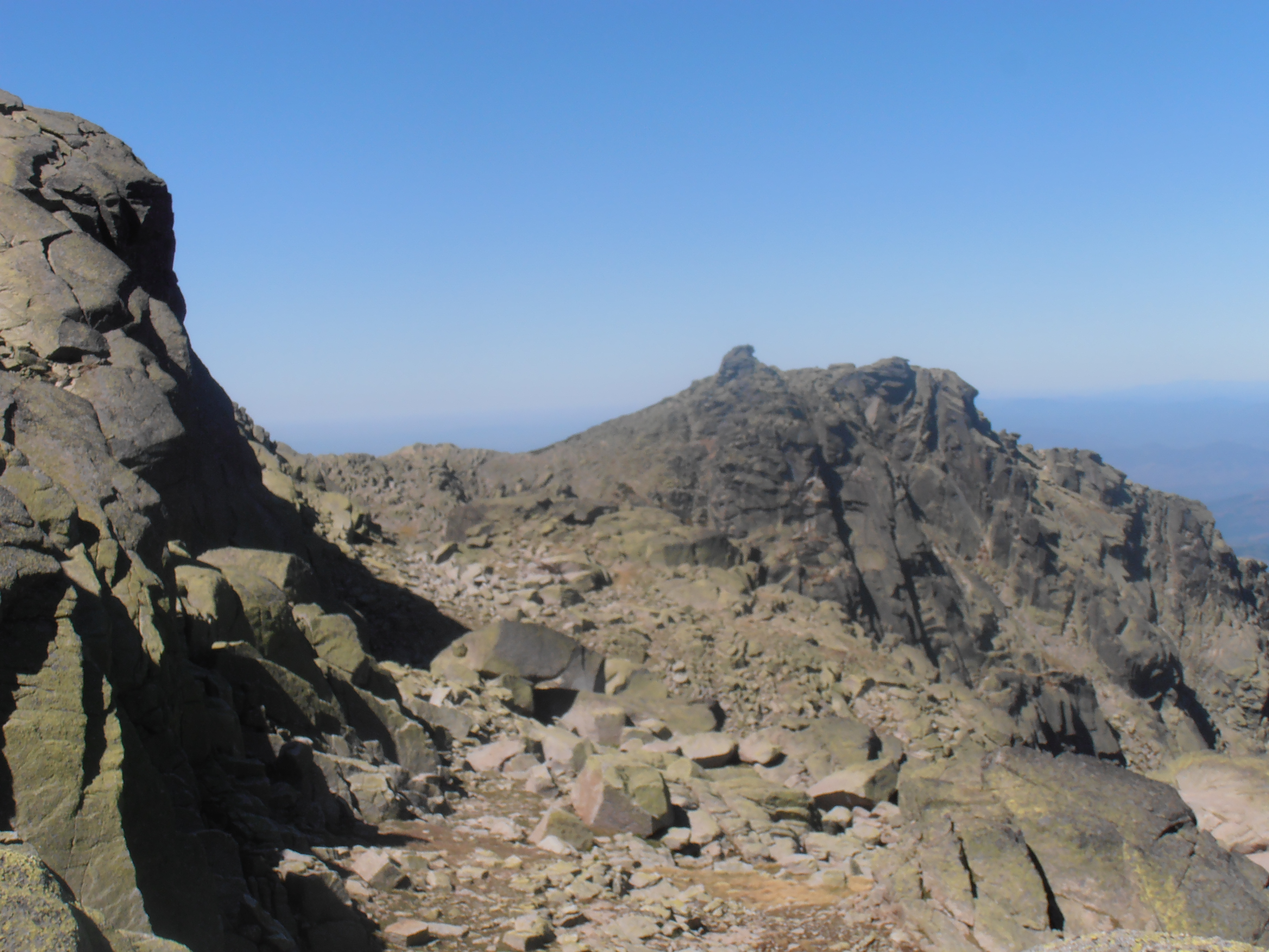 Vista del Calvitero